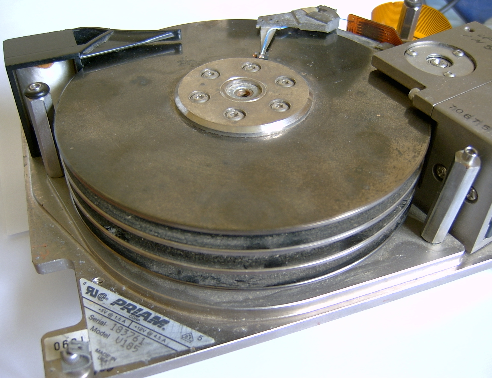 Priam Harddisk